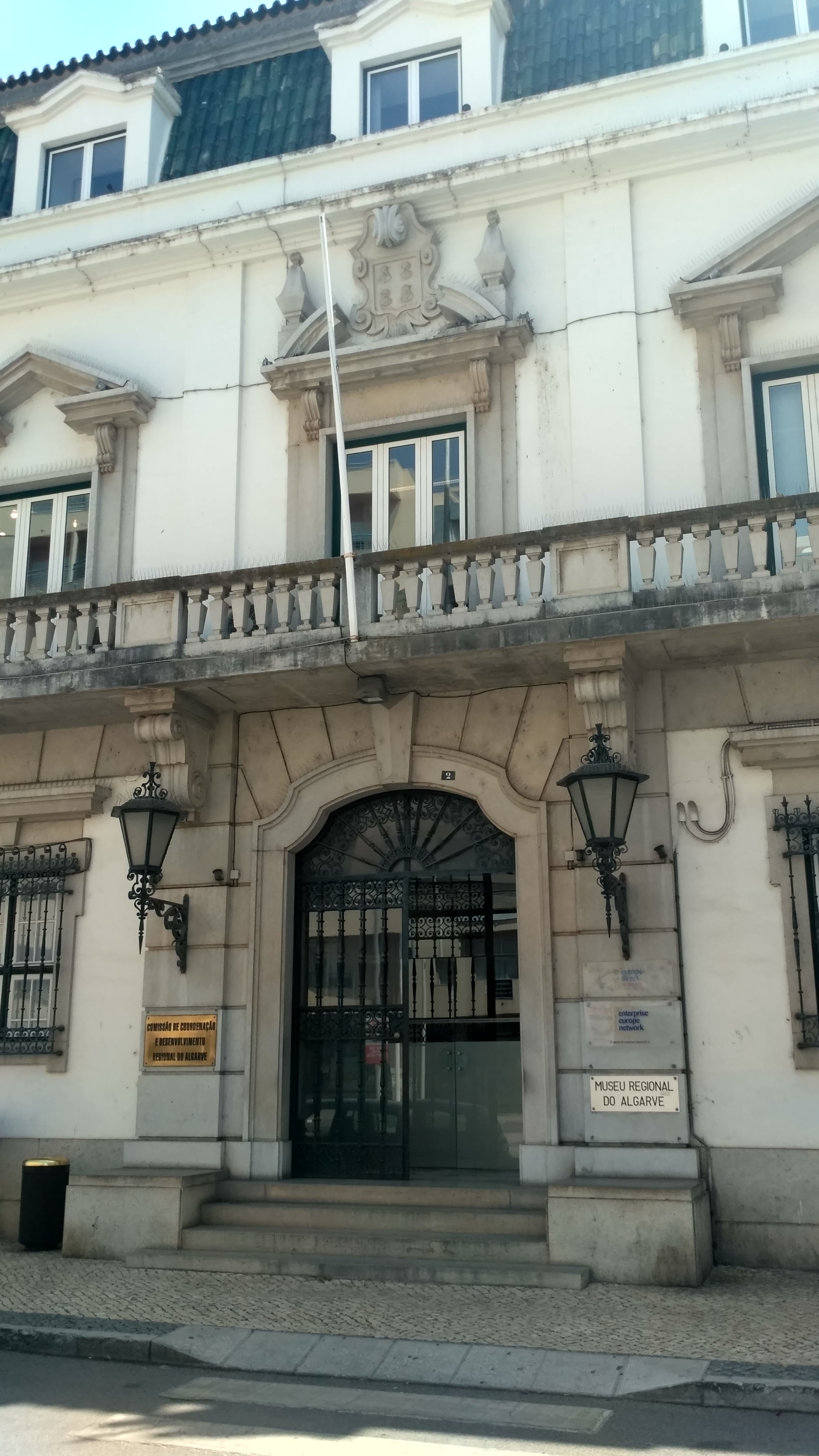 Uma pedra de armas contendo o Brasão de Armas do Reino do Algarve colocado na janela do piso superior que encima a entrada principal do edifício da antiga Junta da Província do Algarve, situado na Praça da Liberdade (Pontinha), em Faro. Actualmente o edifício alberga a Comissão de Coordenação e Desenvolvimento Regional (CCDR) do Algarve e o Museu Regional do Algarve.